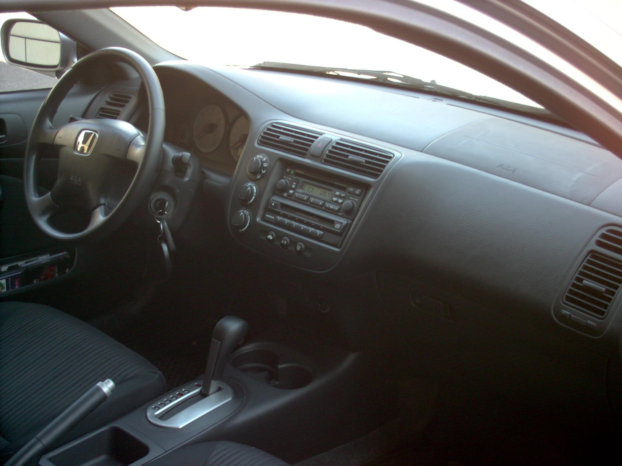 Armaturenbrett Honda Civic Coupé (EM2) mit Automatikgetriebe